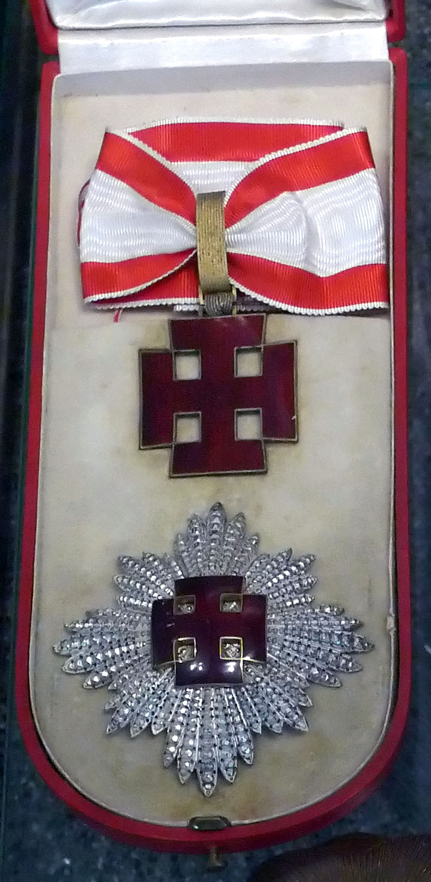 Grosses Goldenes Ehrenzeichen mit dem Stern für Verdienste um die Republik Österreich (1922). Heeresgeschichtliches Museum Wien.